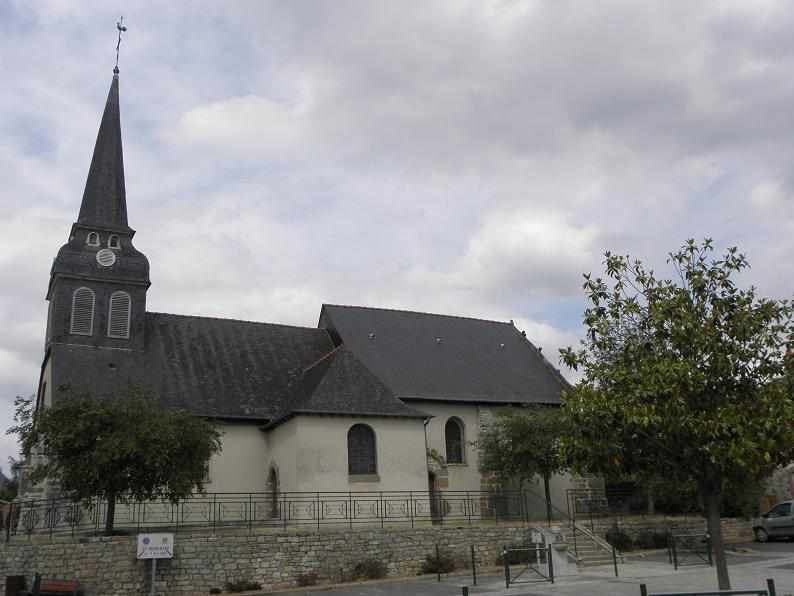 Flanc sud de l'église Saint-Pierre de Chevaigné (35).